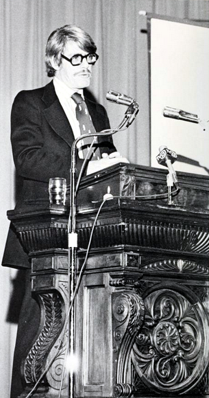 Radu Florescu giving a lecture at Clemson University